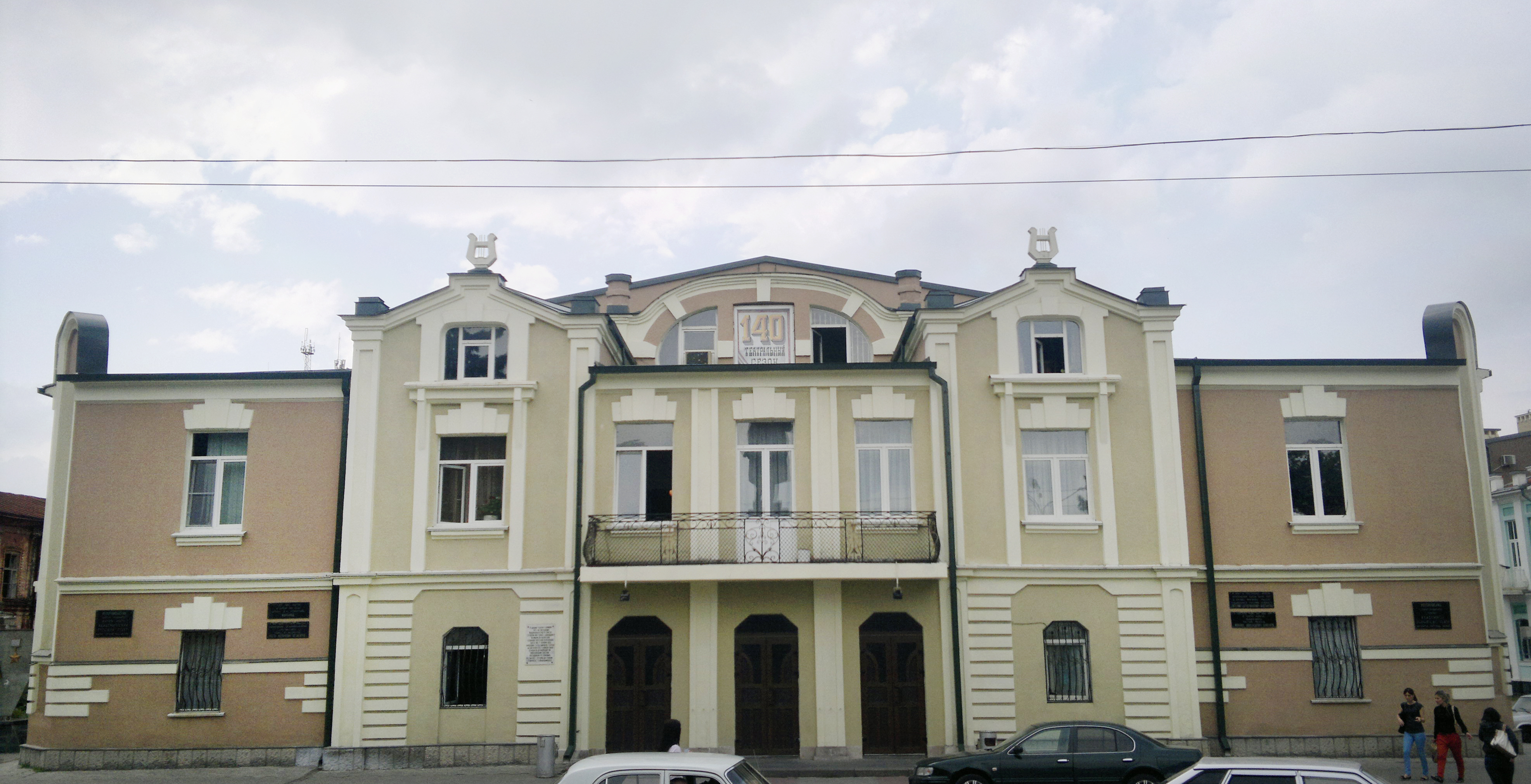 Владикавказский русский театр имени Вахтангова